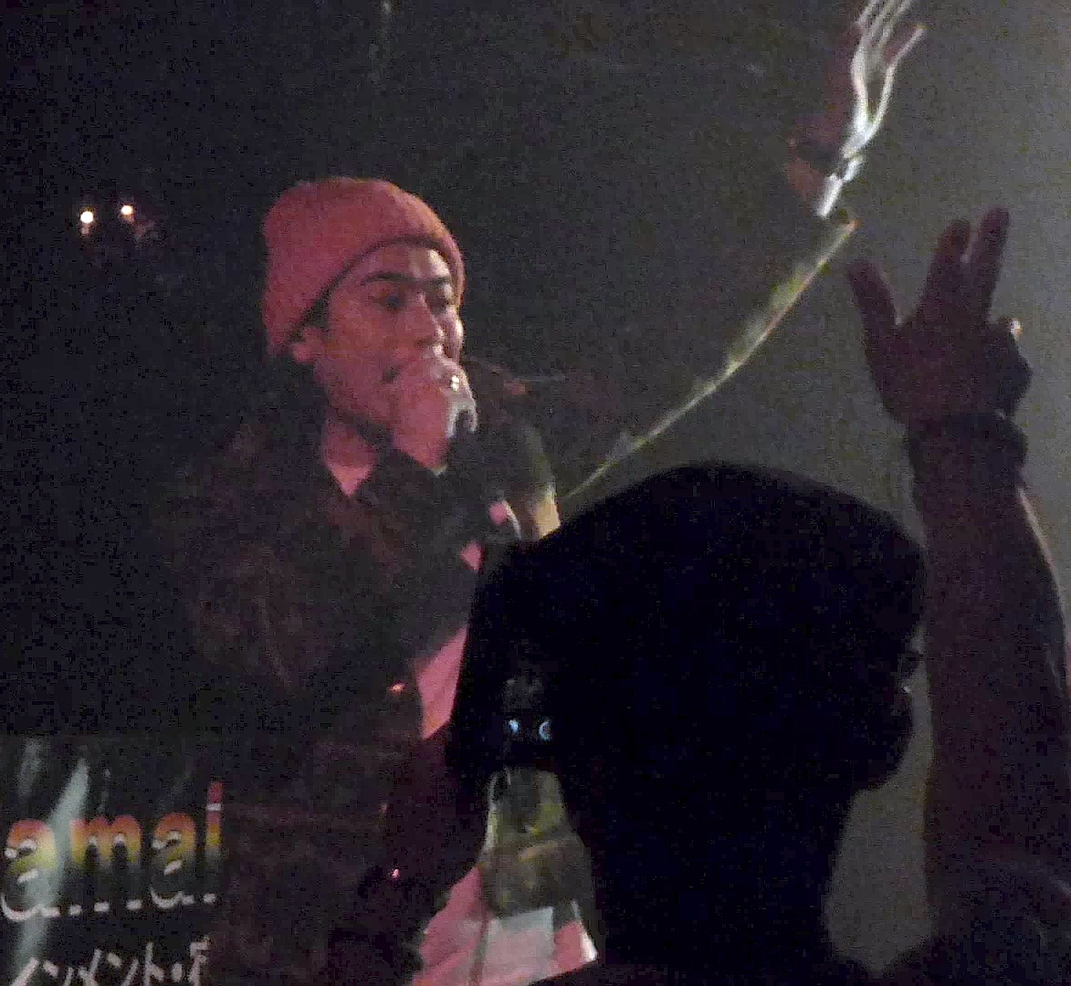 RUEED（るいーど）は、神奈川県横須賀市出身のレゲエミュージシャン。(Rueed, a Japanese Reggae musician).